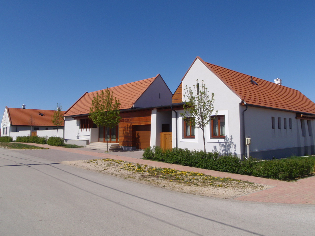 Orvosi rendelő Magyarlakótelepen